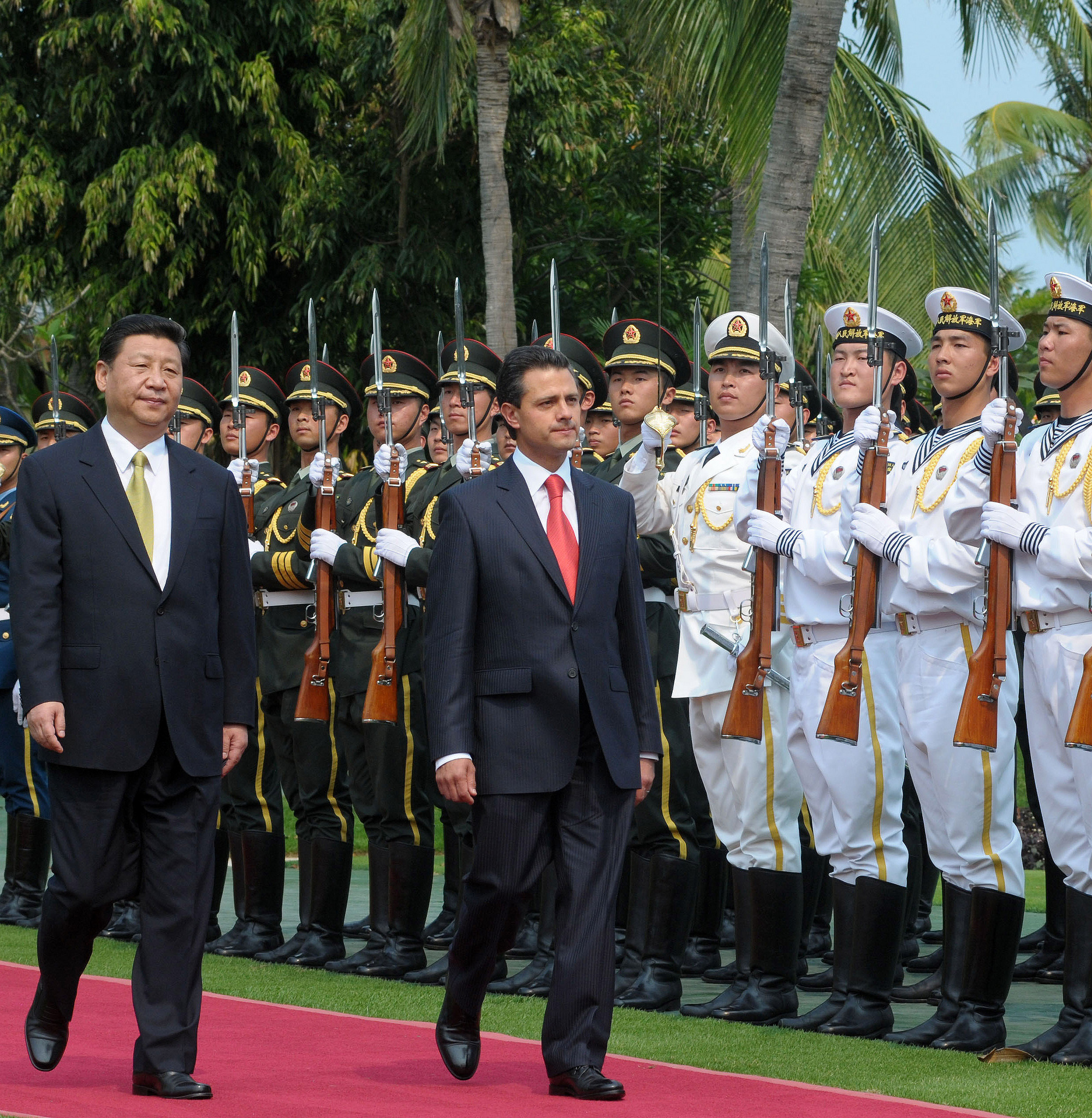 Arribo al Lotus Garden. Recibe Excmo. Sr. Xi Jinping, Presidente de la República Popular de China, y esposa. Ceremonia Oficial de Bienvenida.